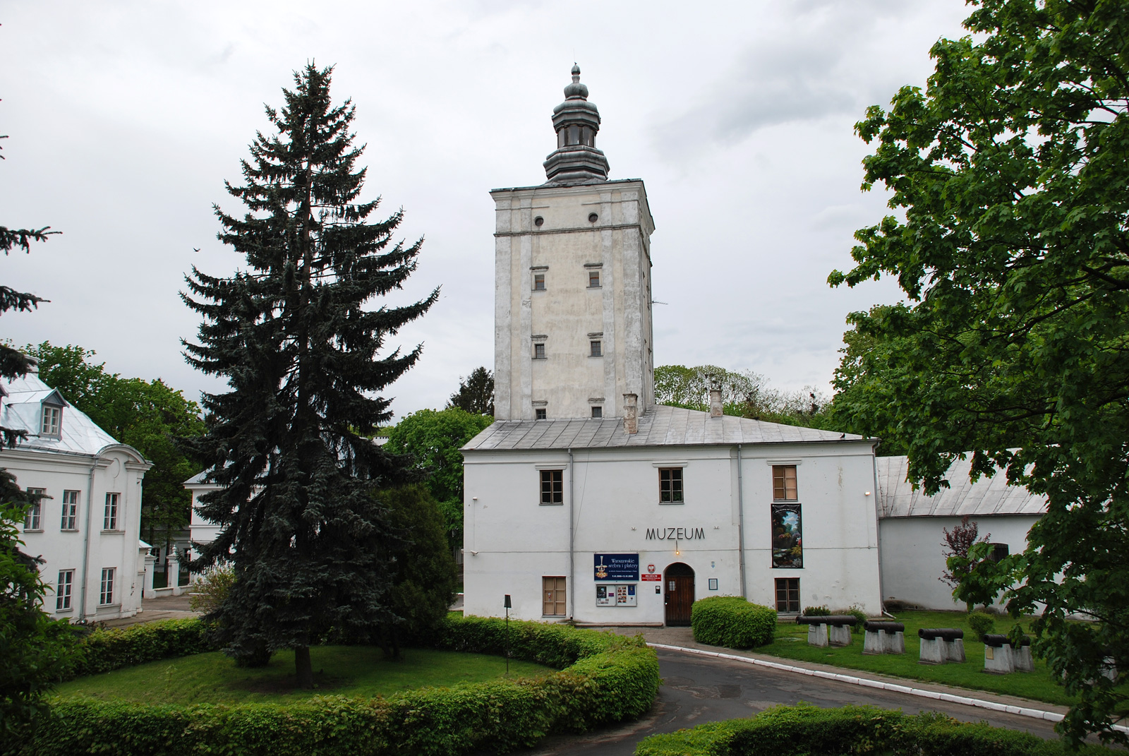 Wieża wjazdowa w zespole pałacowo-parkowym Radziwiłłów, Biała Podlaska